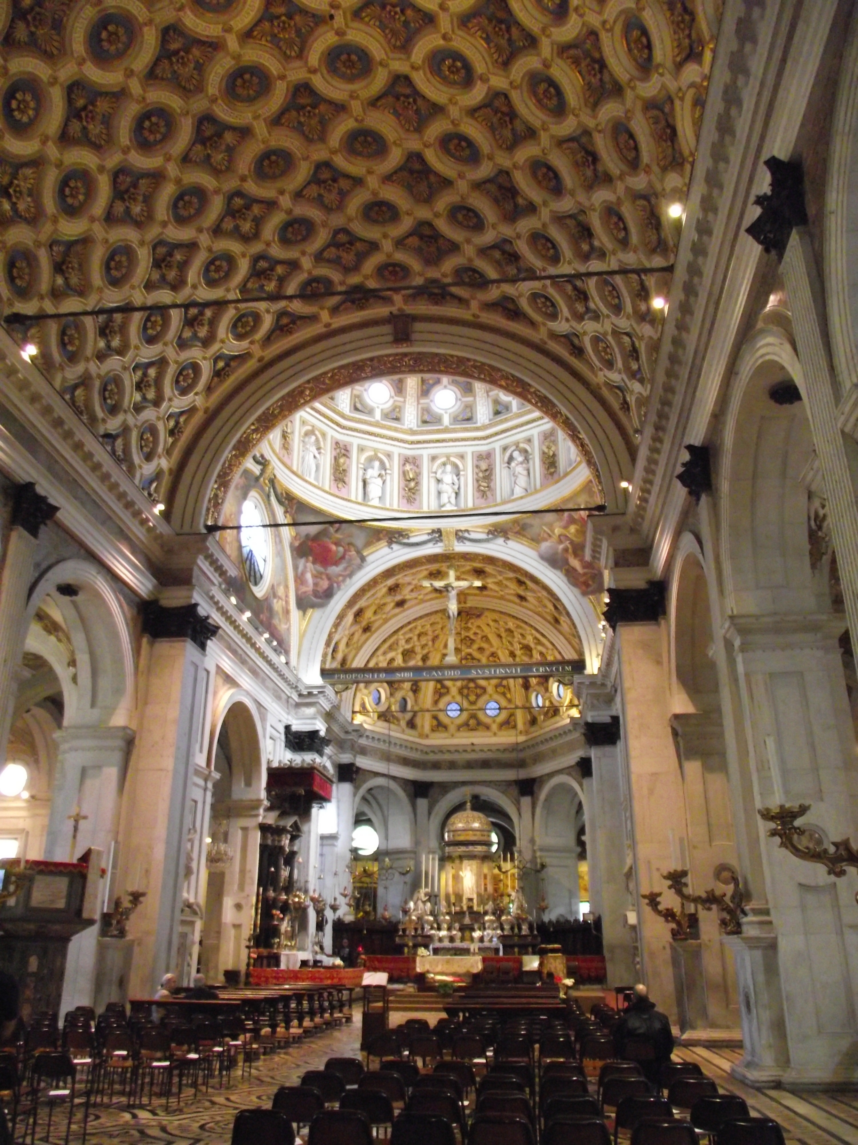 Veduta della navata centrale